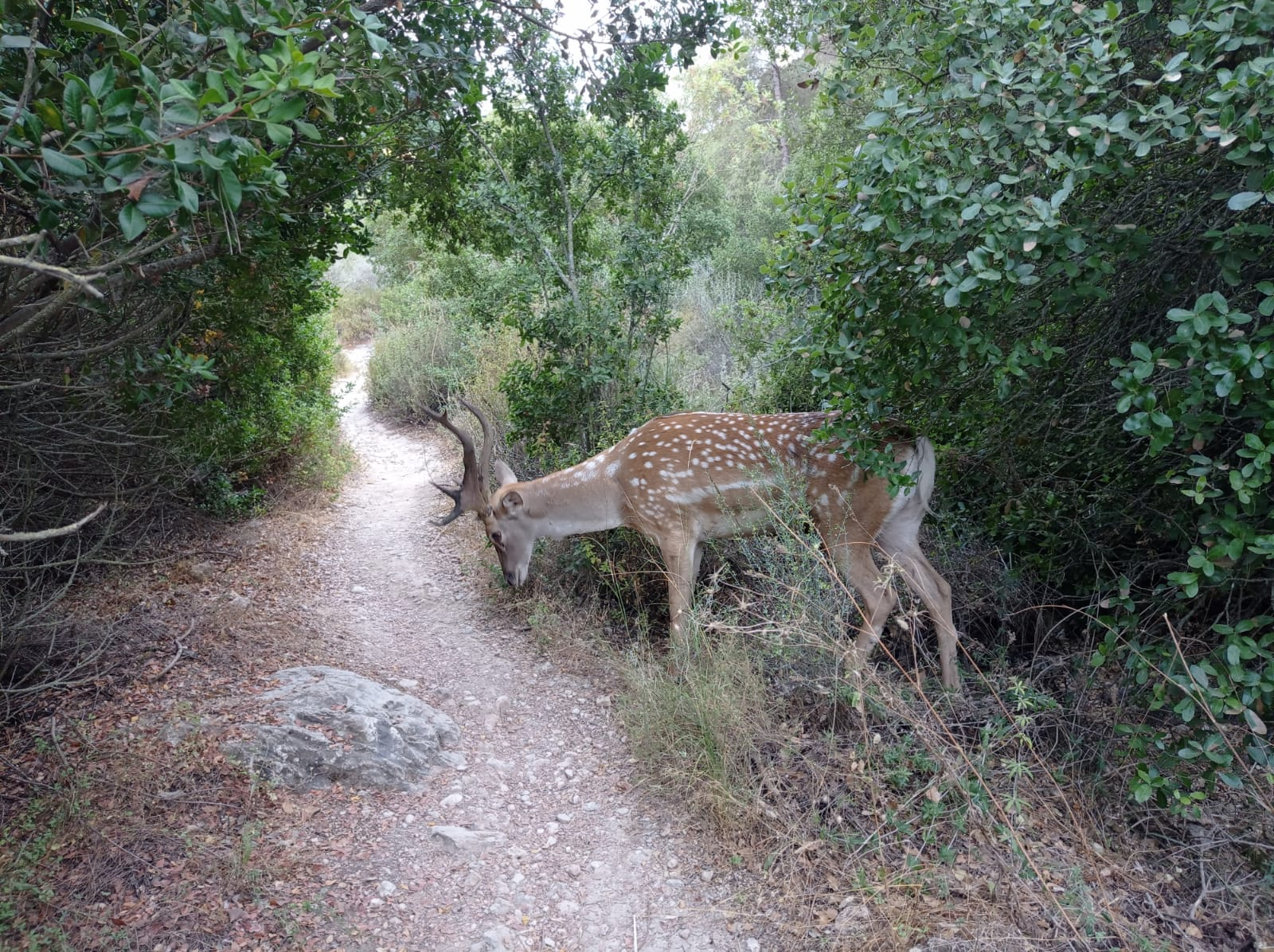 יחמור פרסי (זכר גדול) בערוץ נחל קטלב, אוגוסט 2020. צילום: יואב שורק